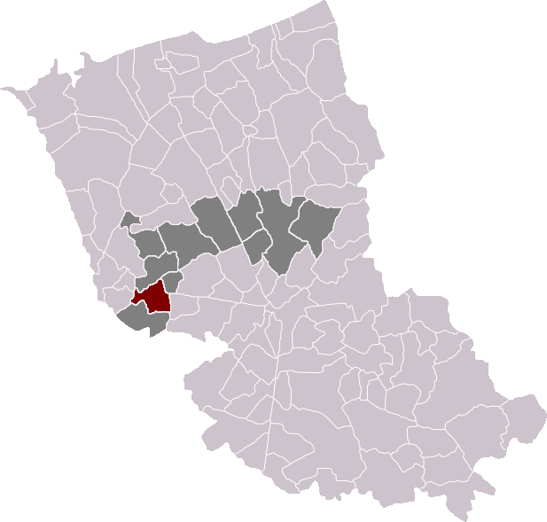 Locatie gemeente Lederzele (Frans-Vlaanderen) in arrondissement Duinkerke. Zelfgemaakt. Location of Lederzeele municipality in the arrondissement of Dunkirk. Self made. Localisation de la commune de Lederzeele dans l'arrondissement de Dunkerque. Fait moi-même.